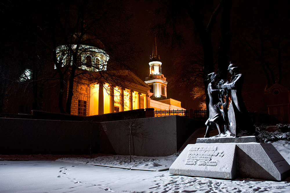 Спасо-Преображенський собор (мур.), Дніпро, пл. Соборна